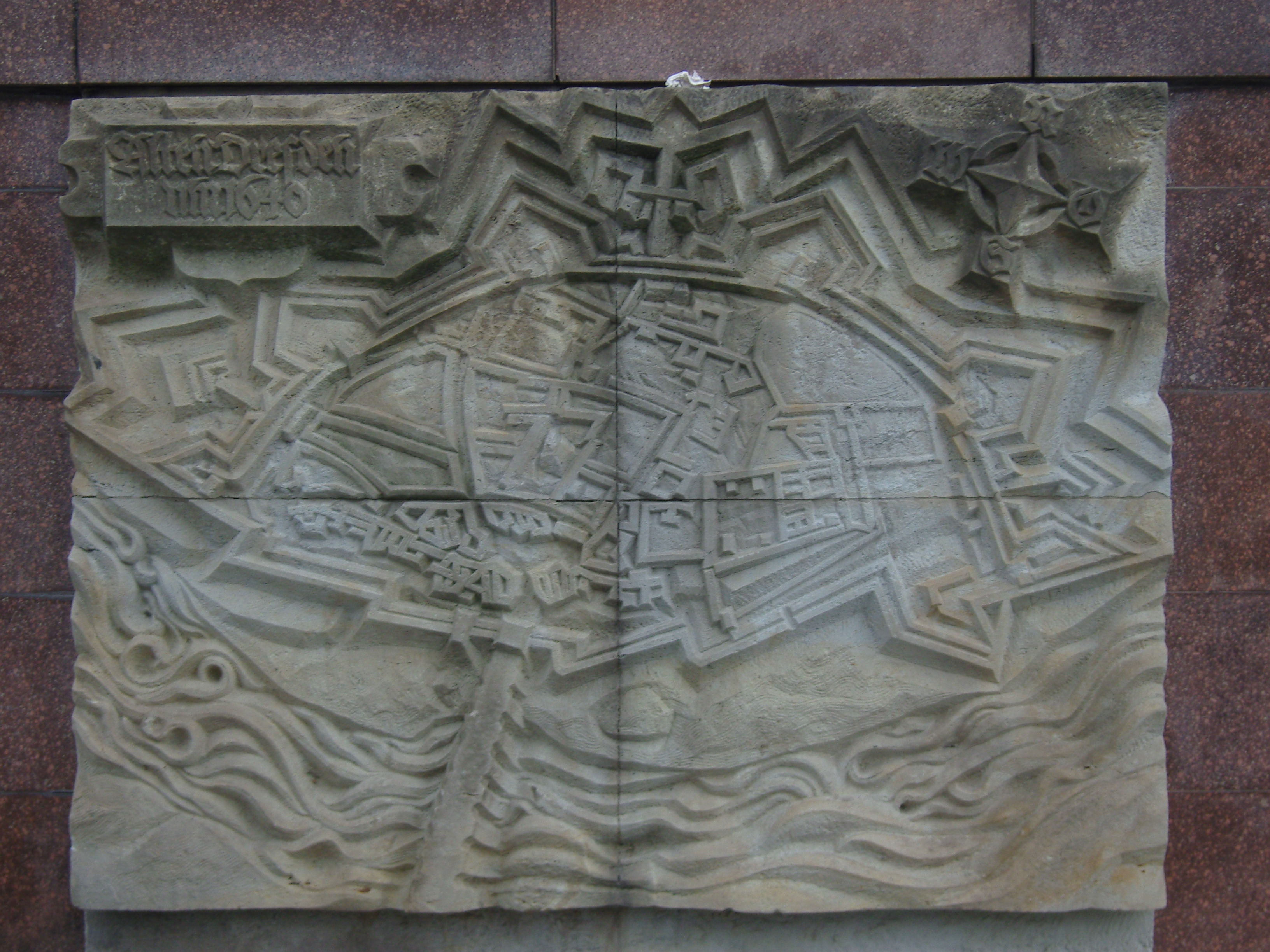 Relief von Dietrich Nitzsche am Fußgängertunnel am Neustädter Markt in Dresden aus dem Jahr 1979, dargestellt ist Altendresden um 1640